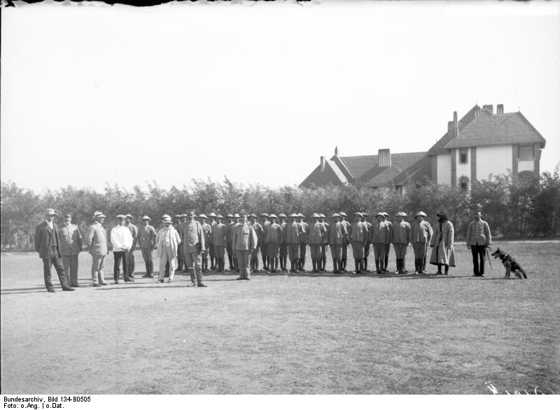 Schutzgebiet Kiautschou Tsingtau : Polizei-Chinesentruppe